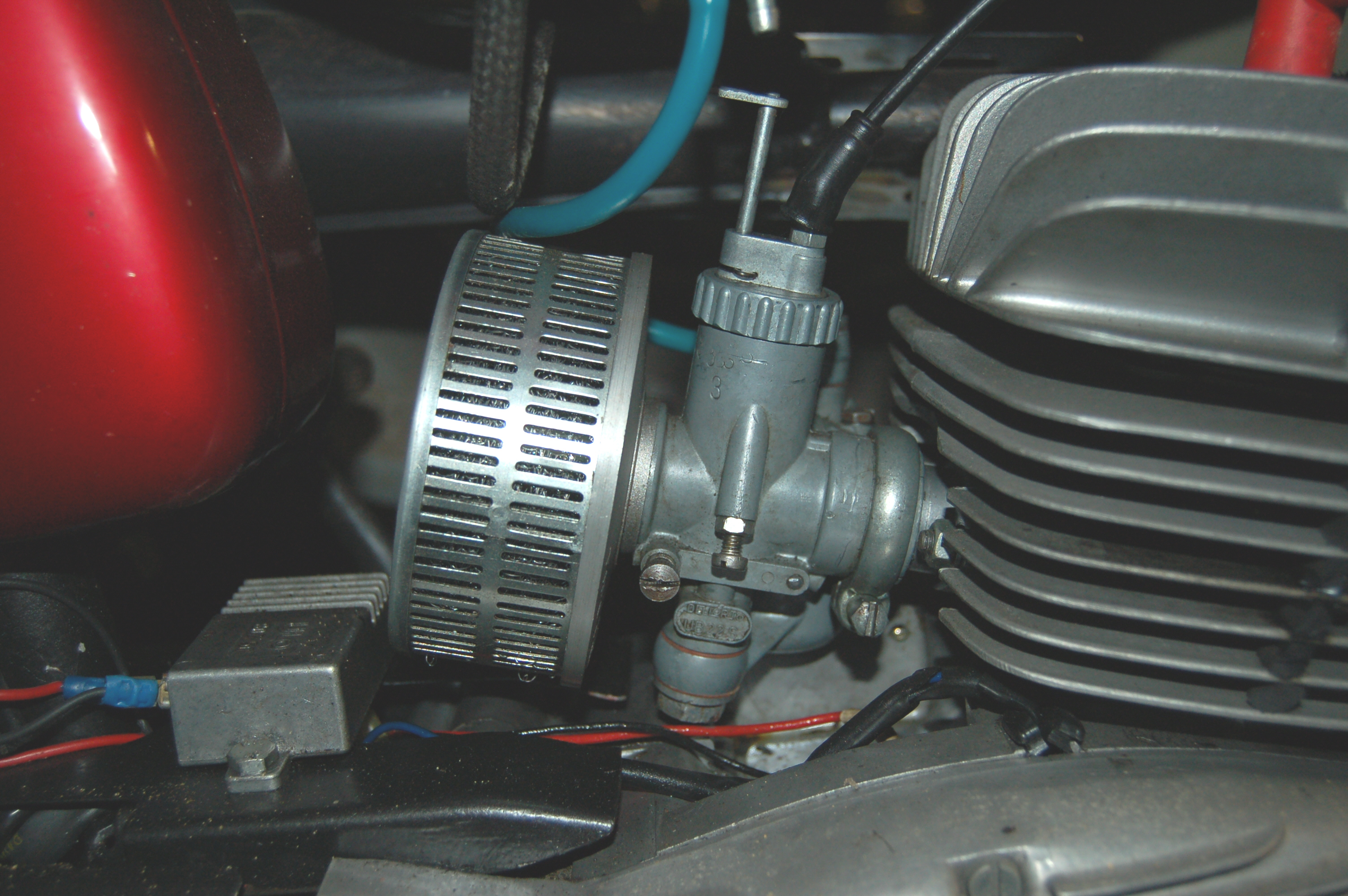 Ein Dell’Orto-Rundschieber-Vergaser UB 22S an einer Garelli.